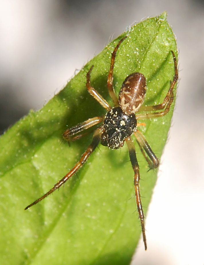 Cyclosa conica, male. Grunewald, Berlin. det. (genitalmorphologisch) K.-H. Kielhorn, Berlin